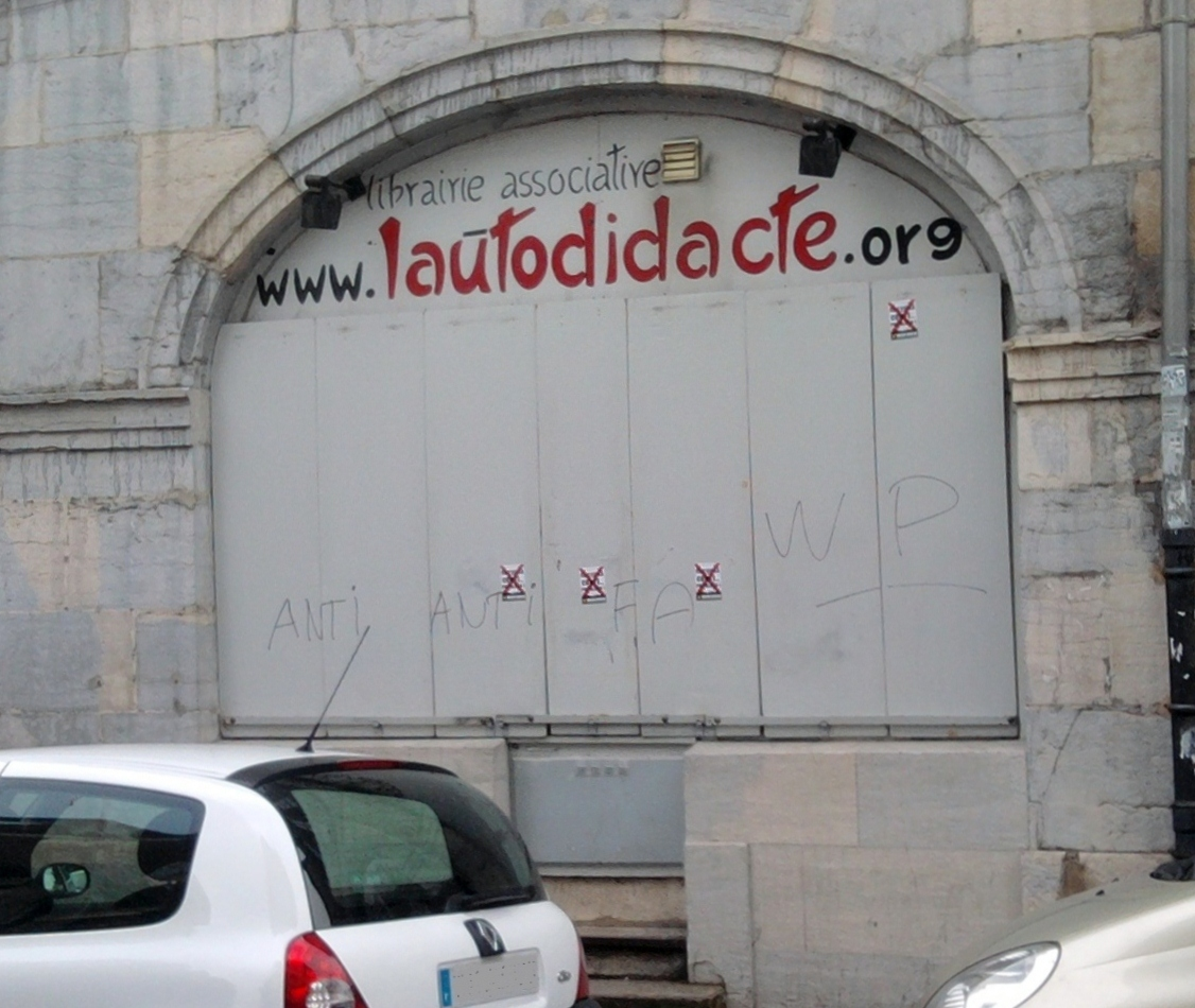 La librairie associative et anarchiste « l'autodidacte » de Besançon (Doubs, France) vandalisée par le mouvement Front Comtois : des affichettes xénophobes et des graffitis prônant la supériorité de la race blanche ont été apposés sur le store du bâtiment.